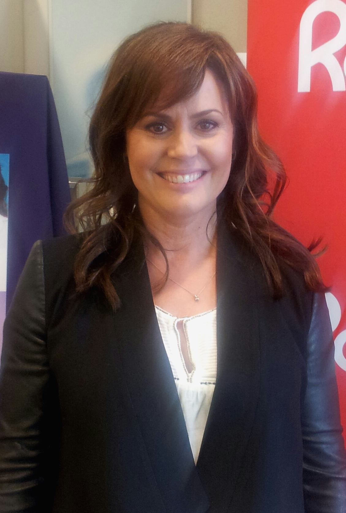 Recadrage et légère augmentation du contraste. Image tirée de cette version.